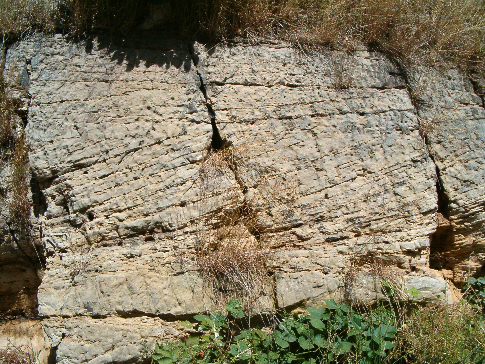 Blottad del av berggrunden i landborgen i Helsingborg. Klippan består av lager av sandsten och lerskiffer.